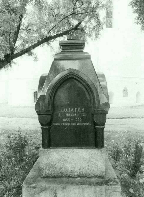 Могила русского философа Л. М. Лопатина (1855-1920) в Новодевичьем монастыре